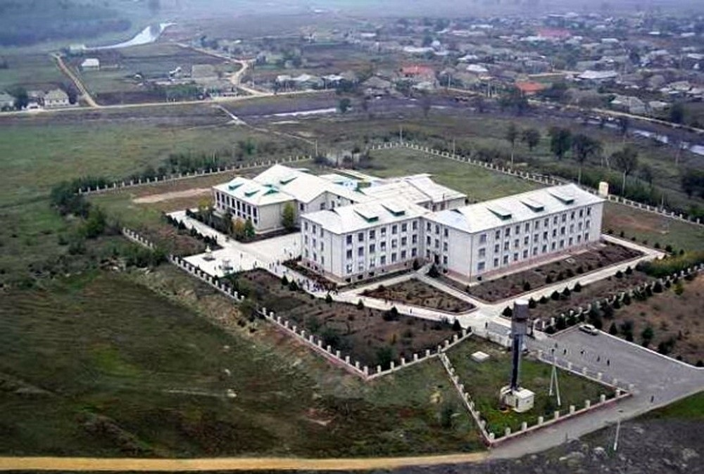 Новоселовская школа